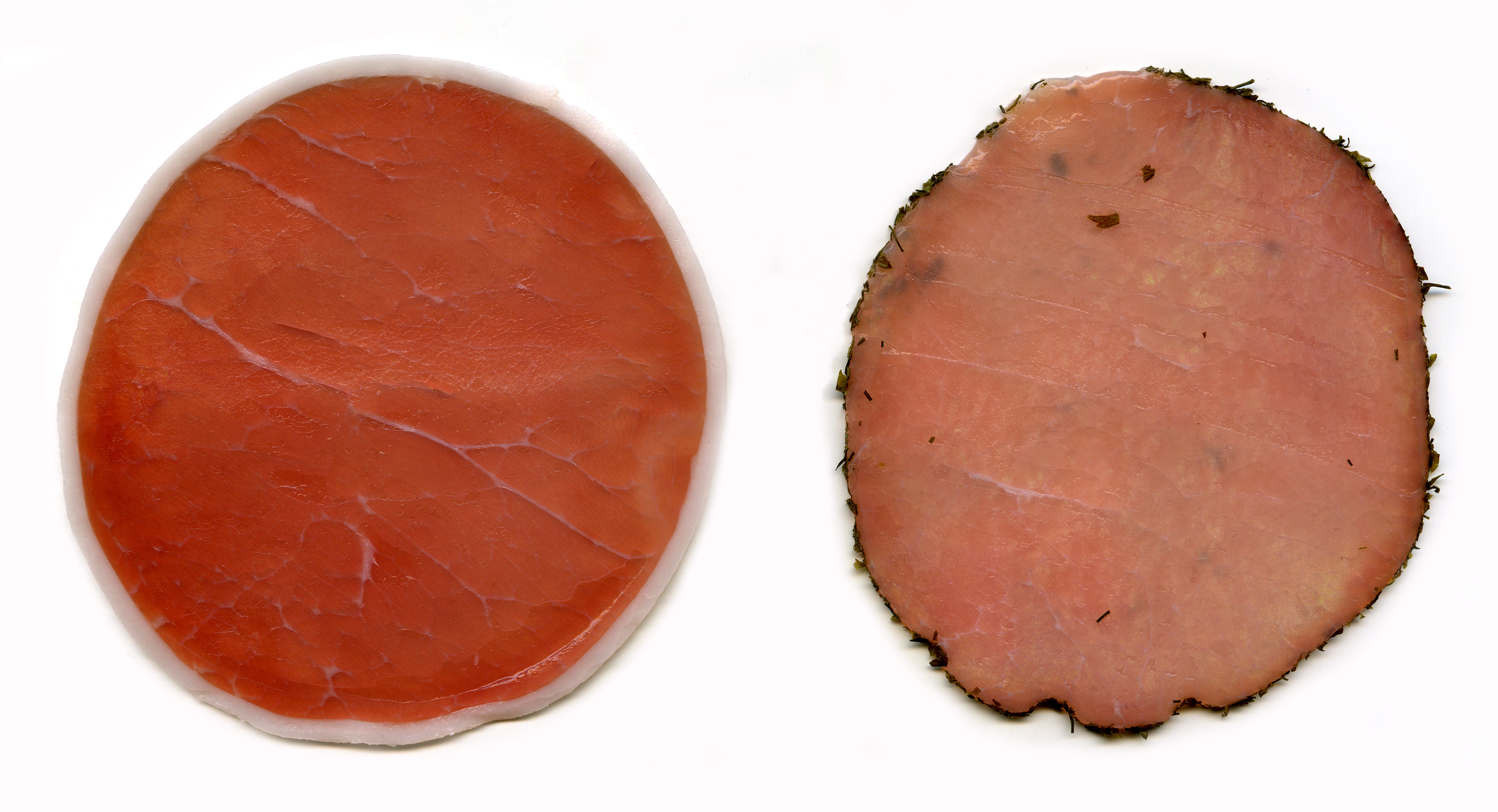 Left: Lachsschinken (smoked lean ham), right: Lachsfleisch (graved lean ham)